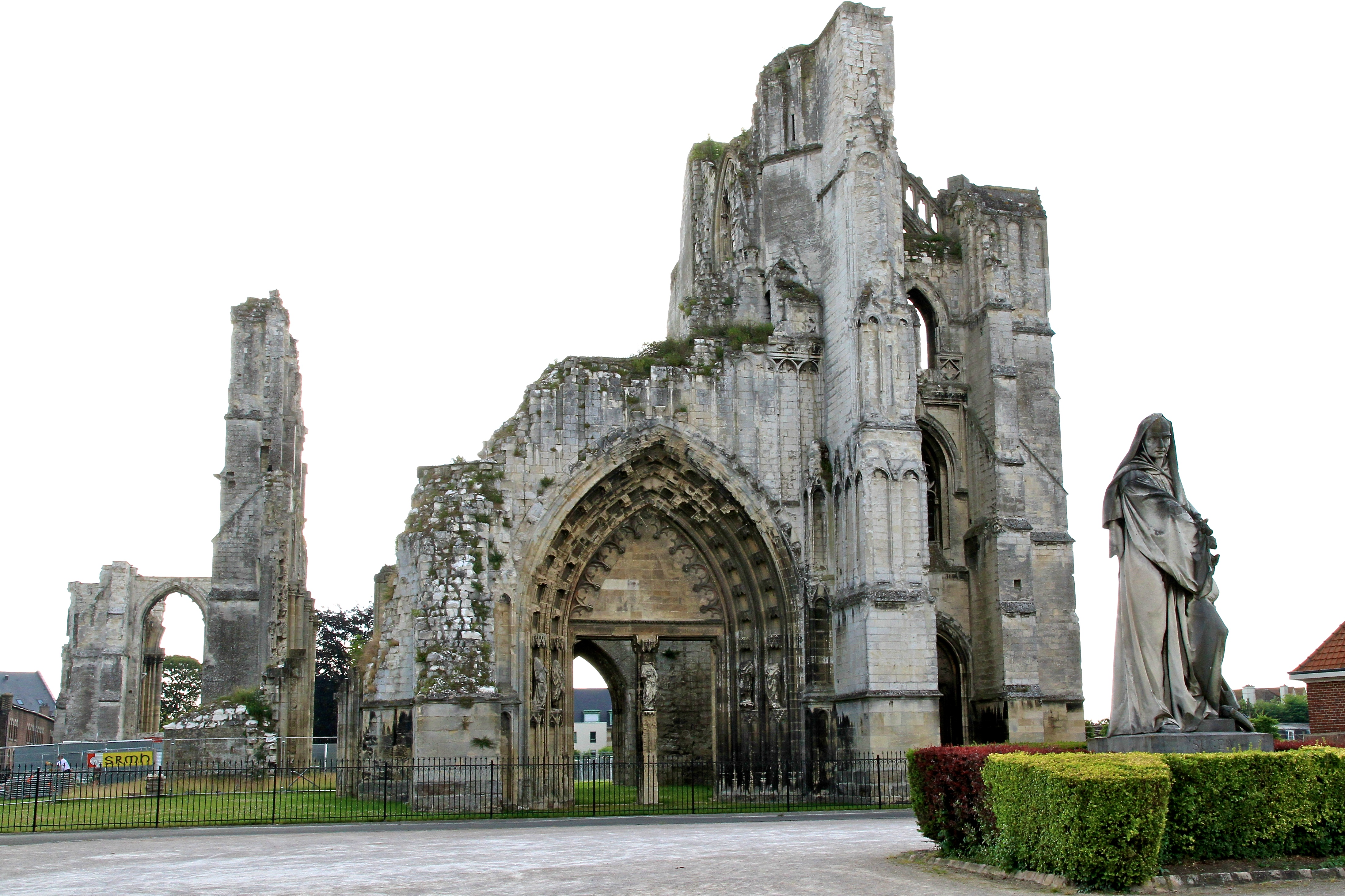 Abbey ruins, St-Omer